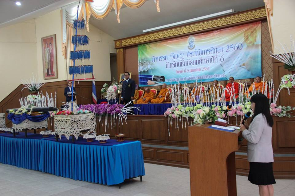 งานวันพร ปีการศึกษา 2560 ส.ว.